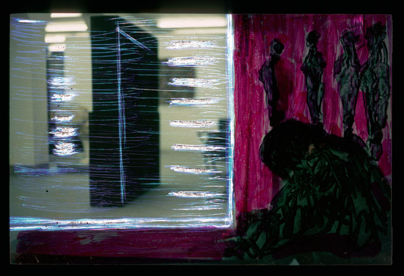 "Sender/Receivers_1982", bemaltes und gekratztes Diapositiv einer Innenraumaufnahme von Nikolaus A. Nessler, 1982